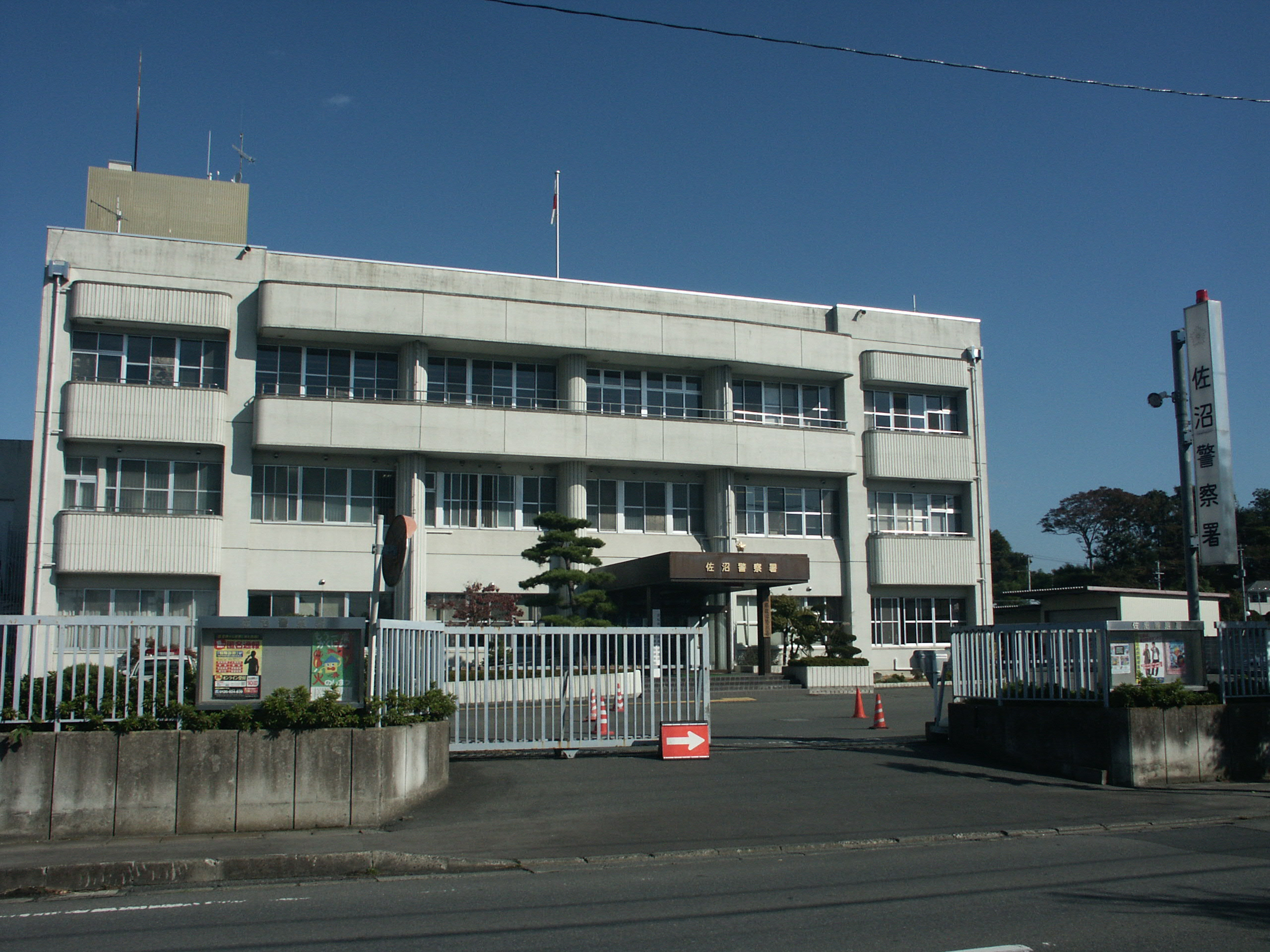 宮城県佐沼警察署庁舎